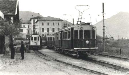 Cles, stazione tranviaria nel 1955